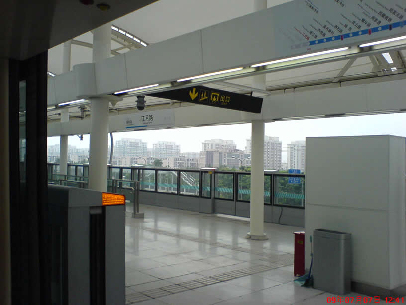 江月路站站台